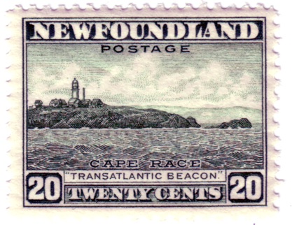 Cape Race Stamp